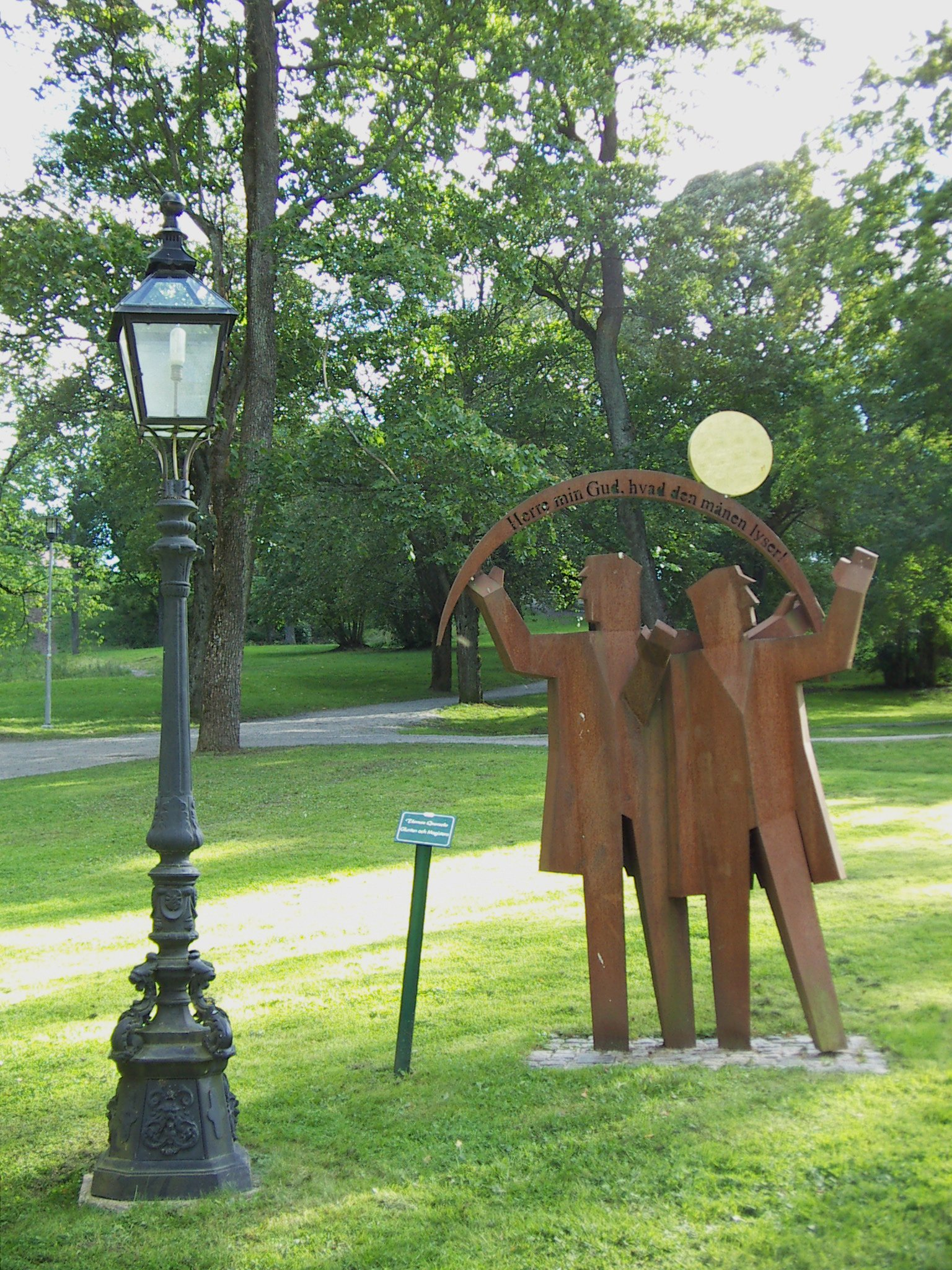 Magisten och Glunten, staty i Carolinabacken i Uppsala.